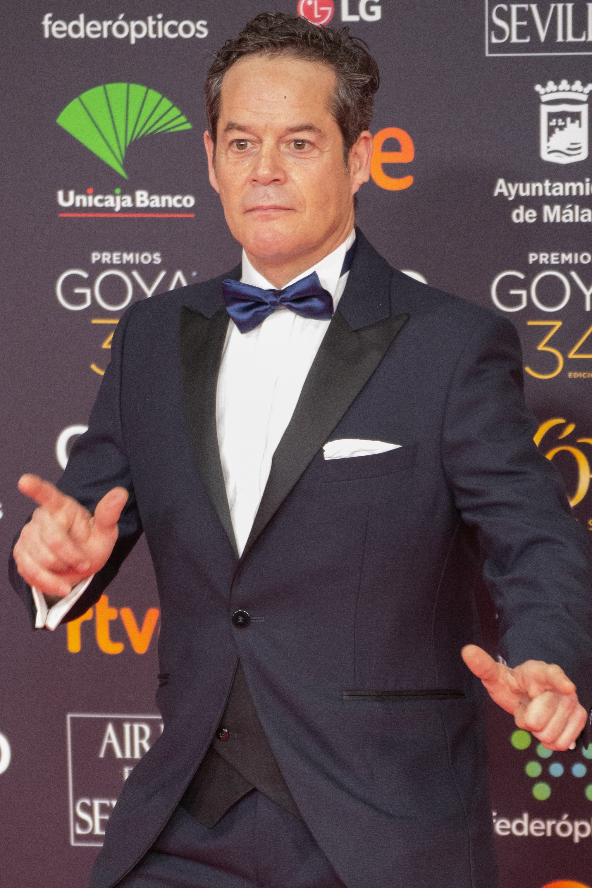 Jorge Sanz en la alfombra roja de los premios Goya celebrados en Málaga en enero de 2020